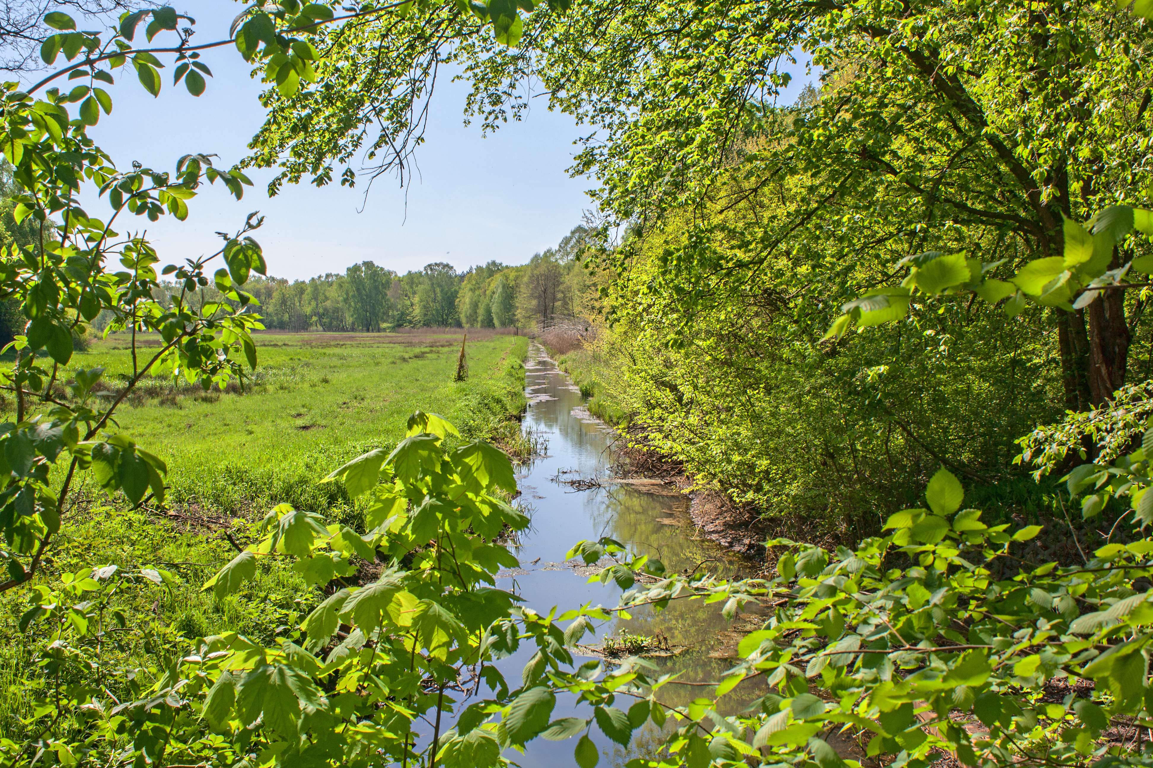 FFH-Gebiet "Muhrgraben mit Teufelsbruch" bei Hennigsdorf, Bötzow und Schönwalde-Dorf. Blick von der "Blockbrücke" des "Jungferndamms" zwischen Bötzow und Hennigsdorf; nördlicher Teil des Gebiets.